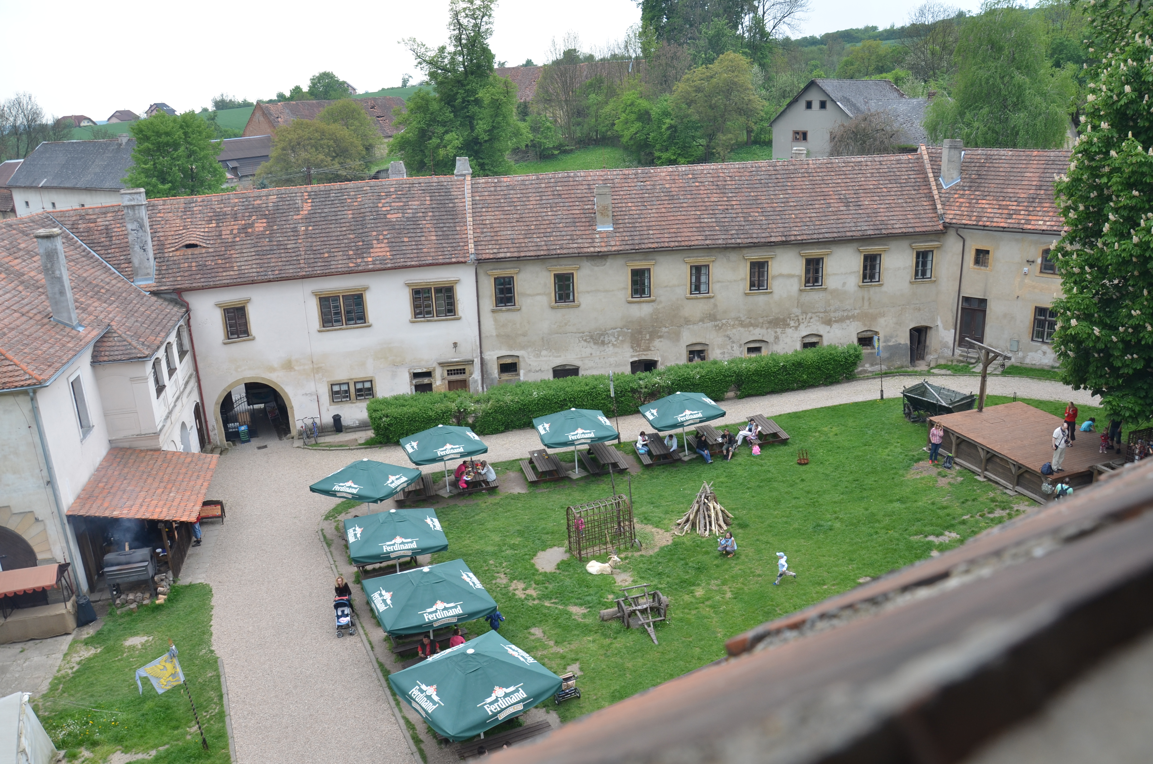 Zámek Staré Hrady s předzámčím a kostelem svatého Jana Křtitele, Staré Hrady 1, Staré Hrady.